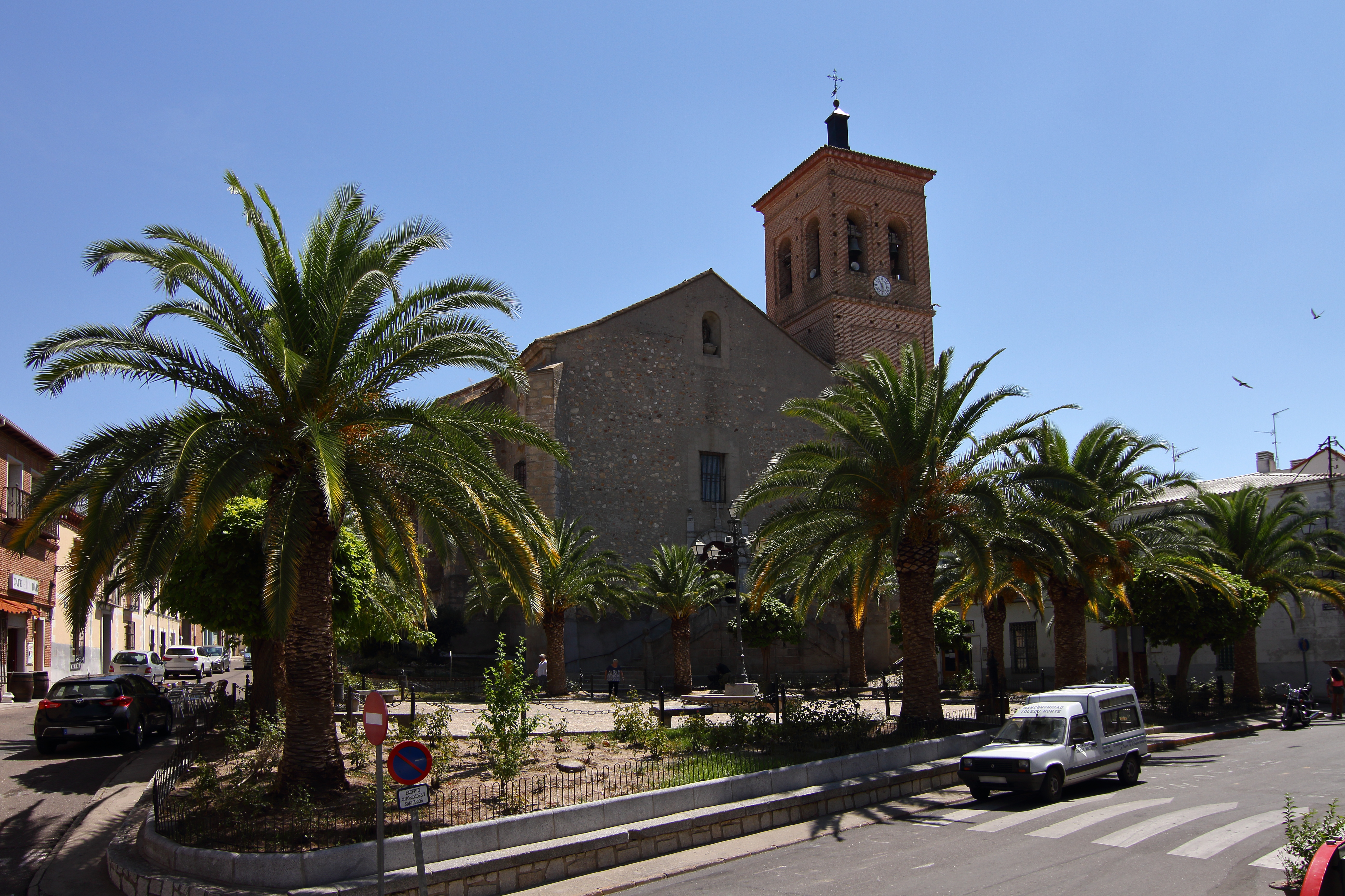 La Torre de Esteban Hambrán, Iglesia de Santa María Magdalena, Plaza de la Constitución